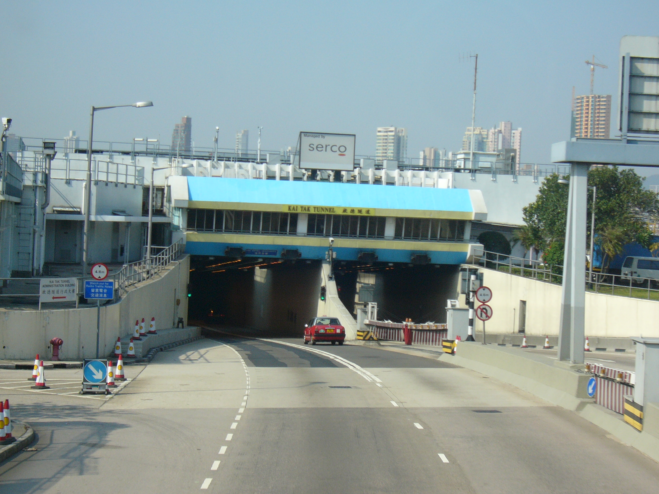 Kai Tak Tunnel east entrance